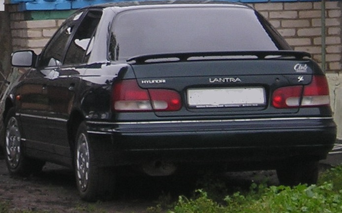 Хёнде Лантра J1 рестайлинг, вид сзади.